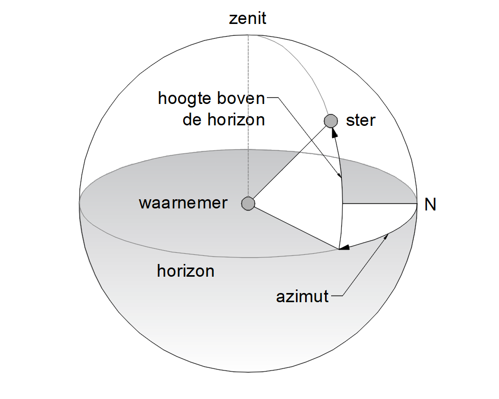 getekend met AutoCAD